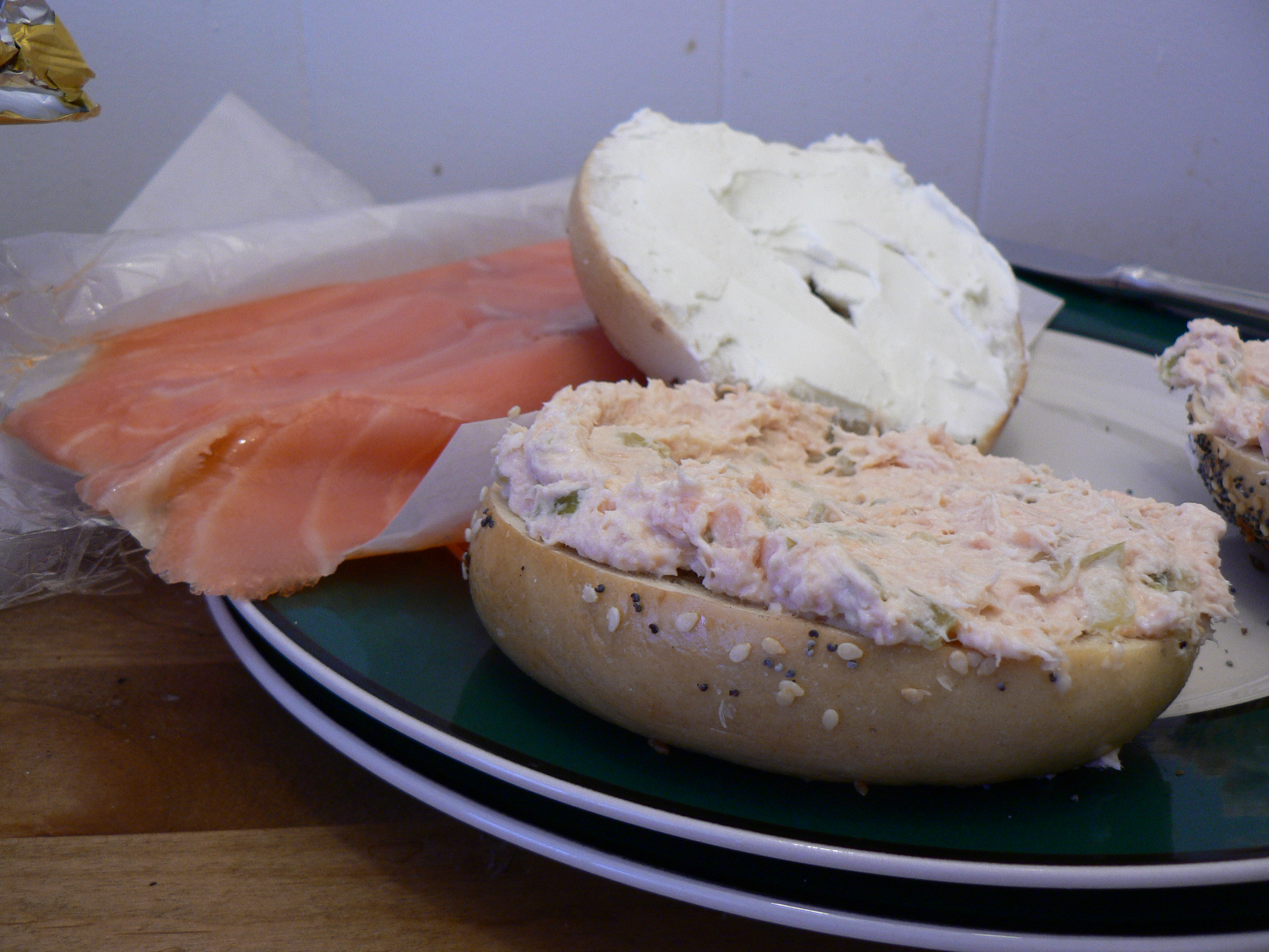 lox and baked salmon salad